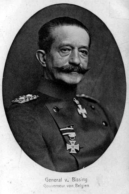 Moritz von Bissingen